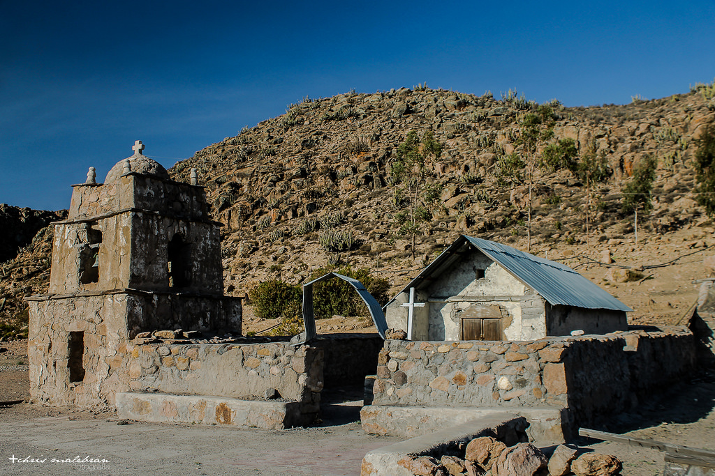 Iglesia de Tulapalca